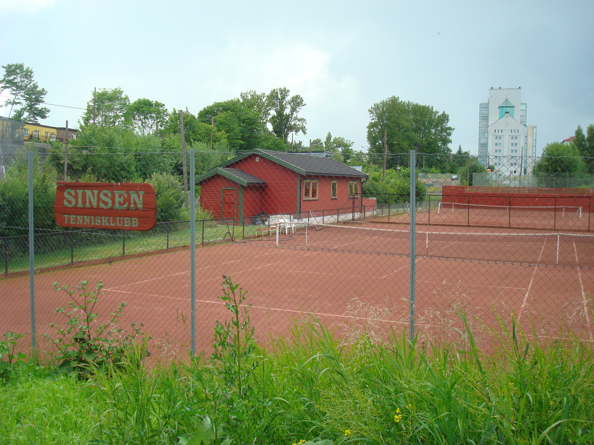 Sinsen Tennisklubbs anlegg ved Sinsenparken i Oslo.